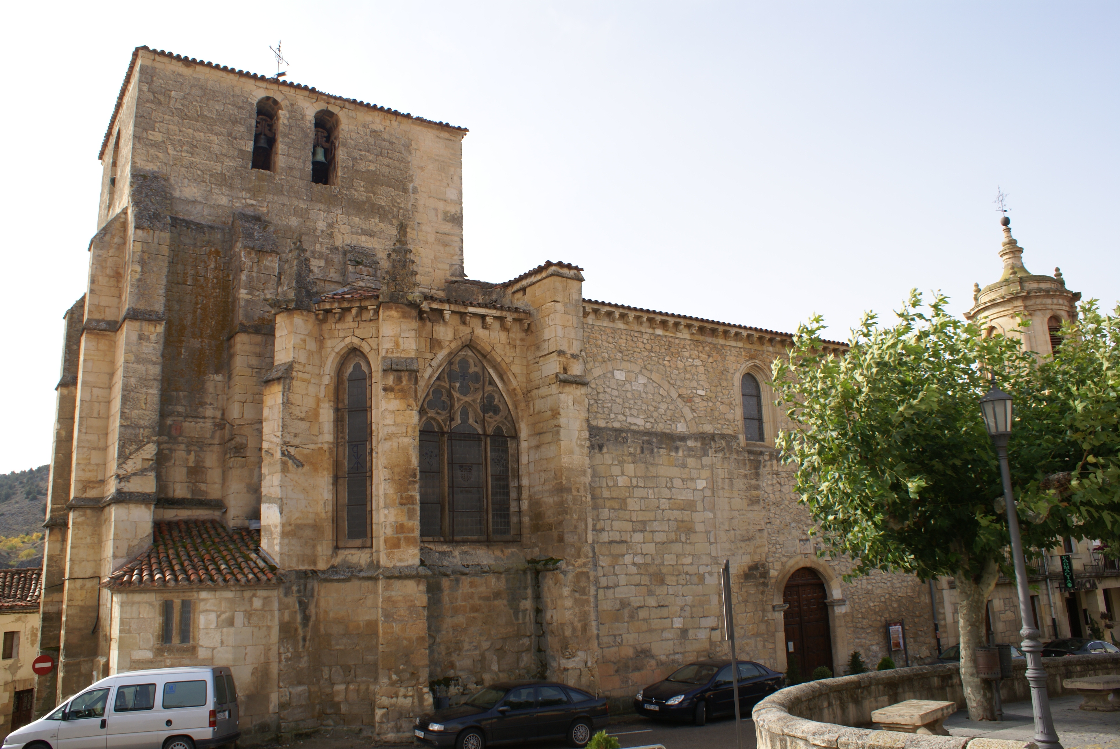 Iglesia de San Pedro de Santo Domingo de Silos, provincia de Burgos.